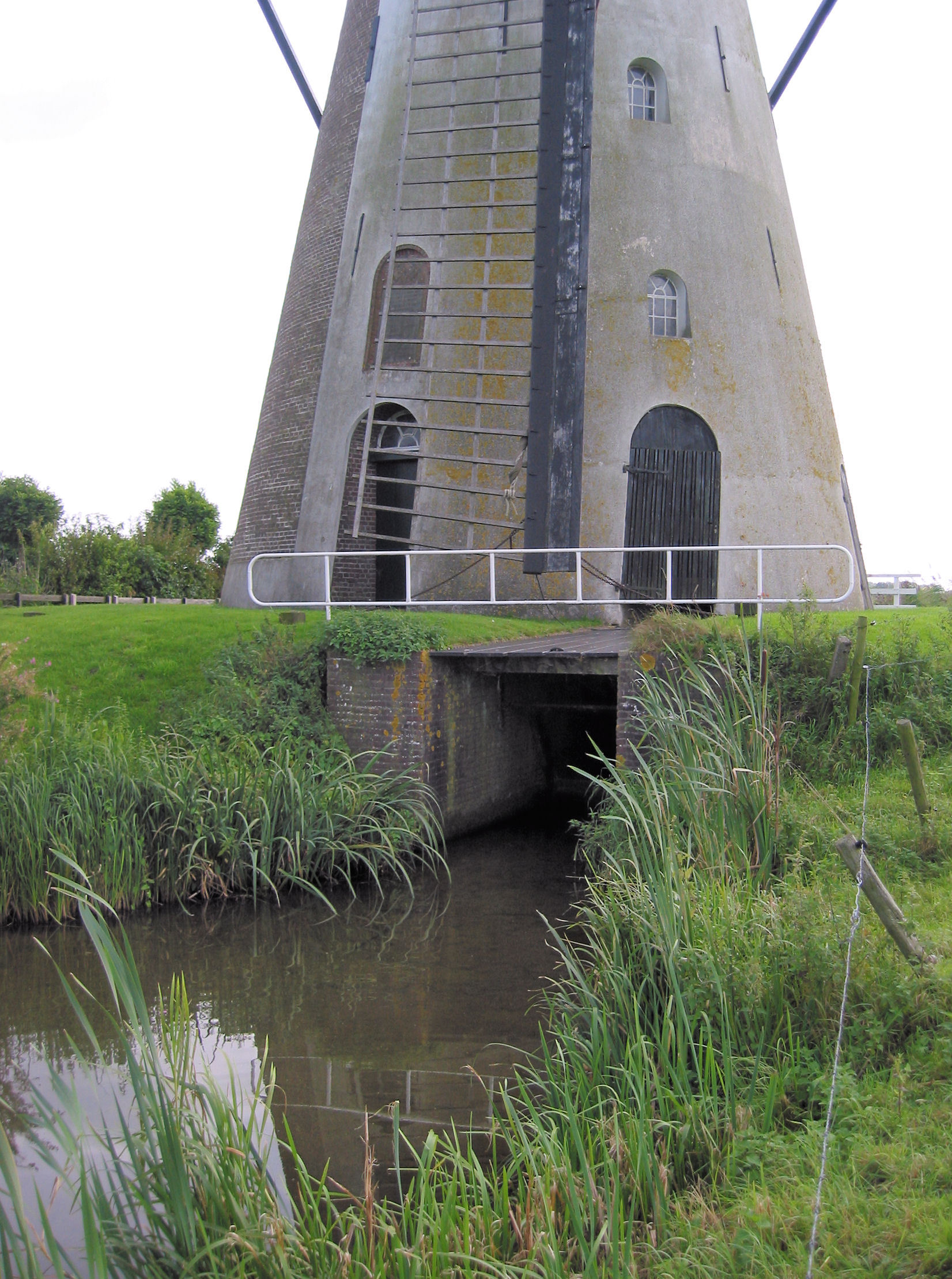 Voorwaterloop poldermolen De Marsch Lienden, Gelderland, the Netherlands